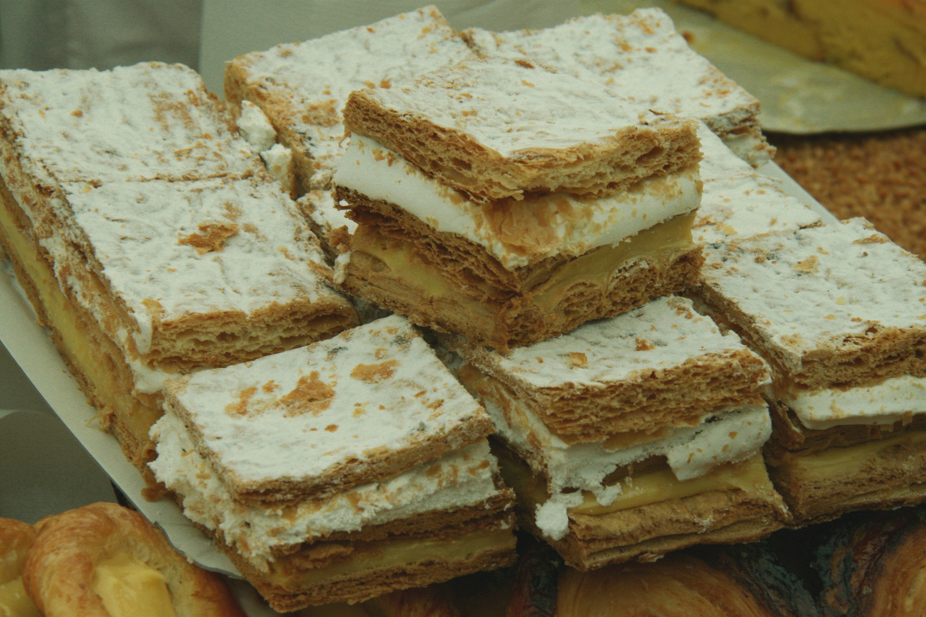 Millhojas Dos cremas de nata y pastelera (parte inferior)